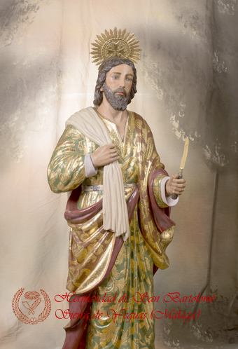 Talla de San Bartolomé.